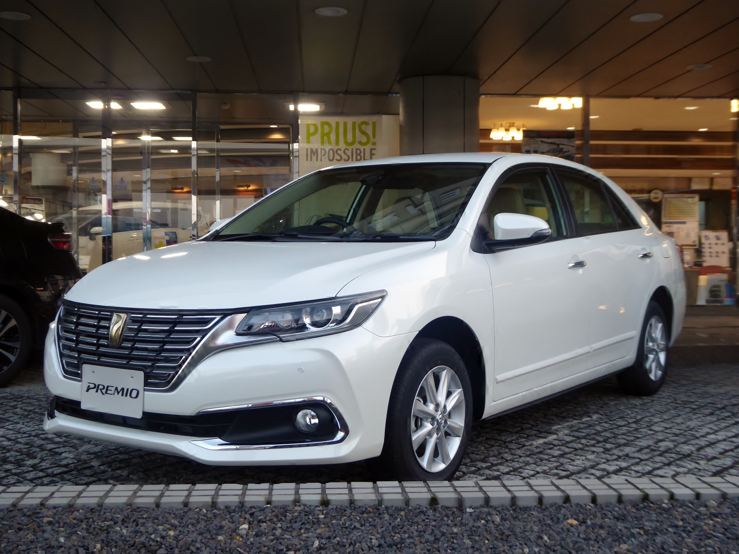 DBA-NZT260-AEXEK型トヨタ・プレミオ1.5F Lパッケージを撮影。